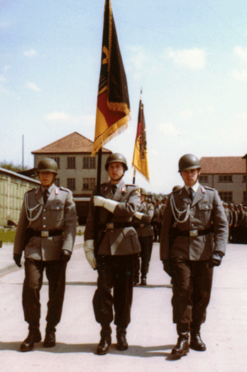 Fahnenabordnung der Bundeswehr (Fangschnur der Fahnenbegleitoffiziere)